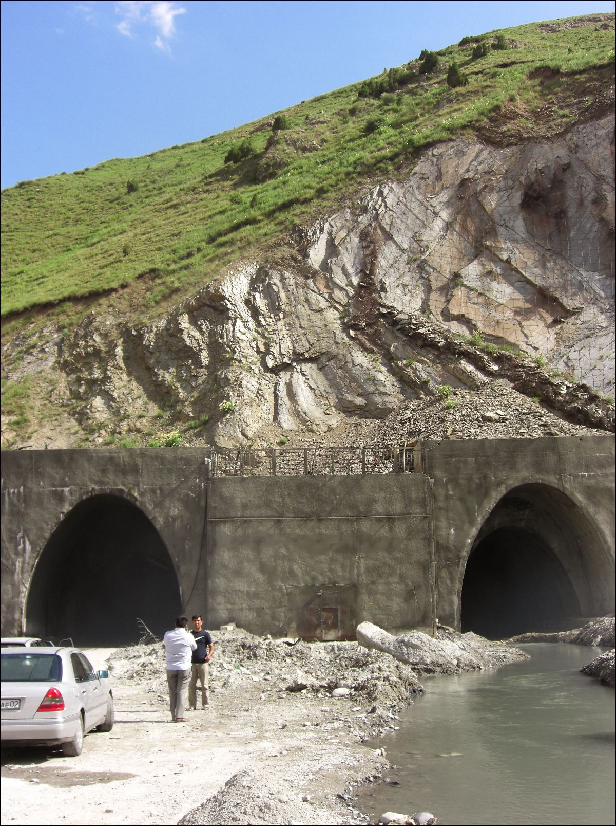 Nordportal des Ansob-Tunnels, aus einer Röhre fließen große Mengen Tunnelwasser talwärts